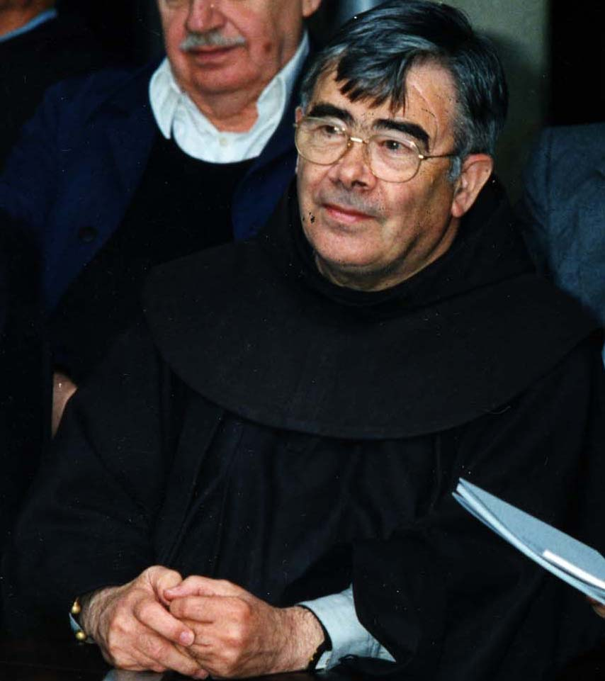 Luis Villasante euskaltzaina, 1989an.